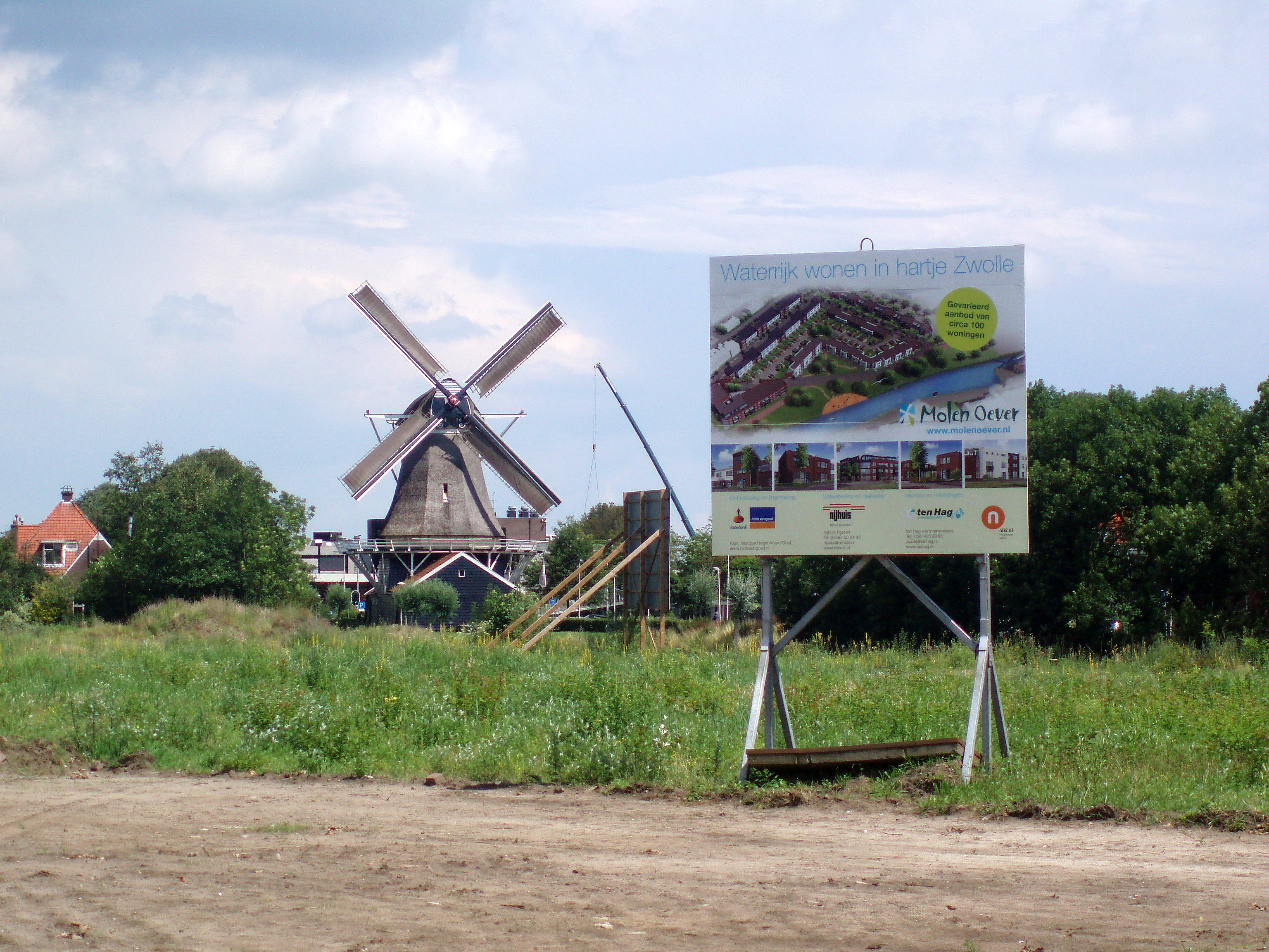 Braakliggend stuk terrein van het voormalige fabriekscomplex Golden-Wonder in Zwolle. Bord met aankondiging dat hier het project Molen Oever gerealiseerd zal gaan worden.